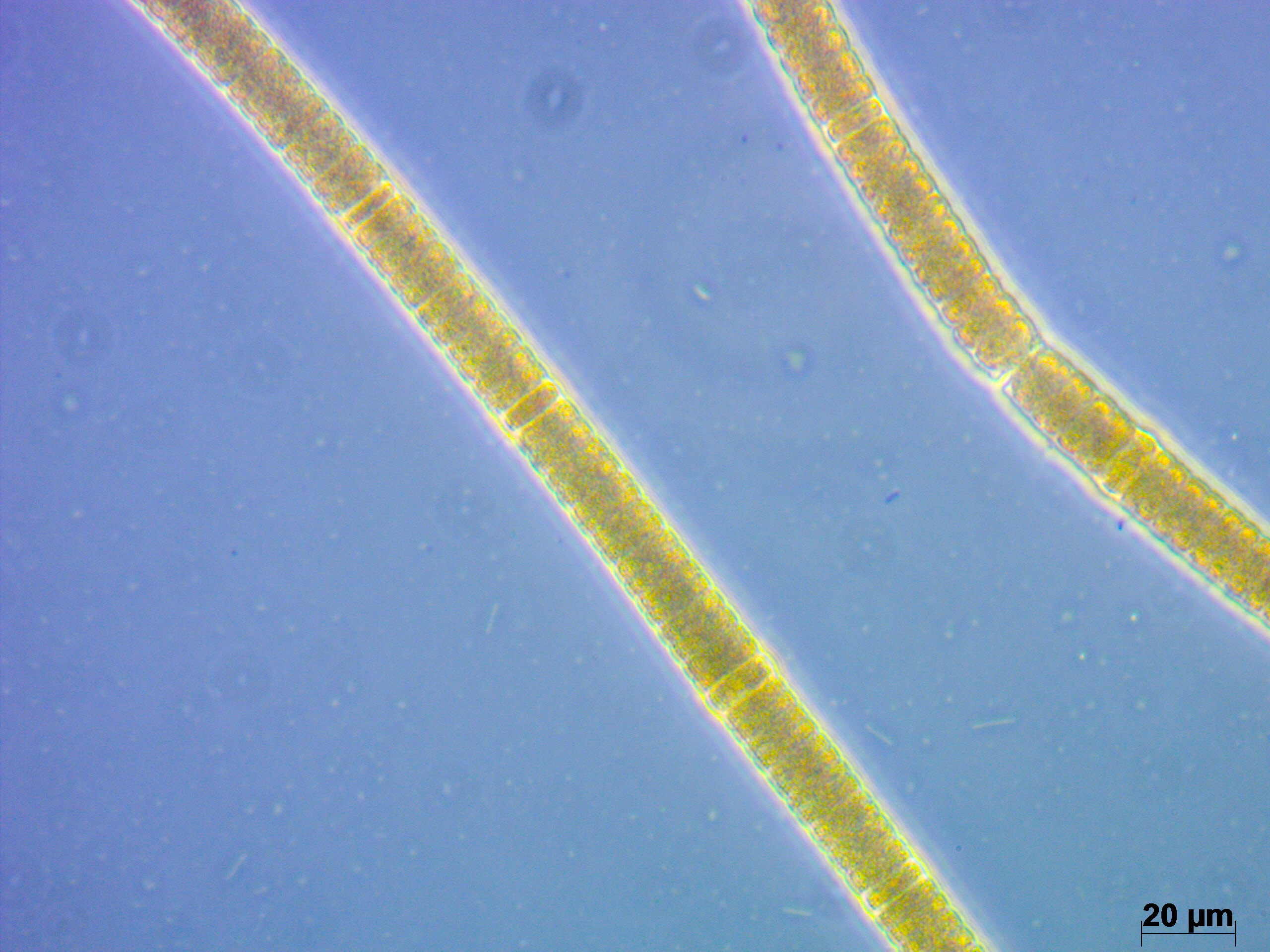 Närbild på Nodularia Spumigena